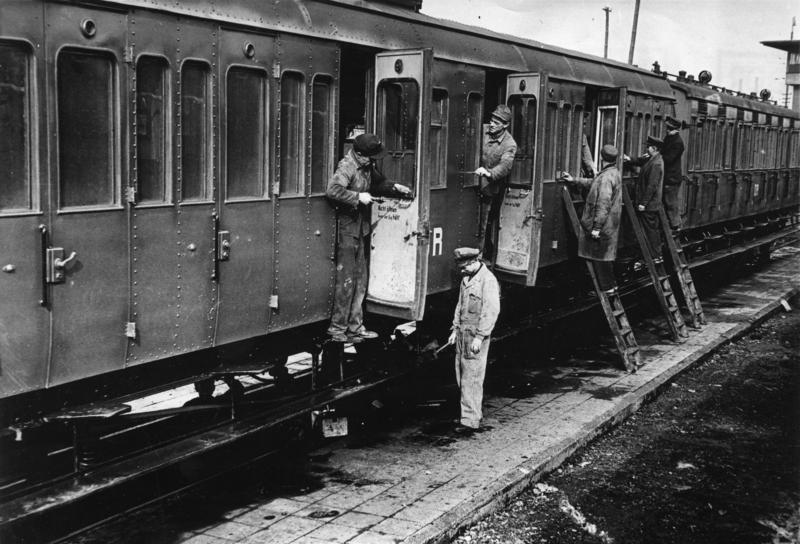 Erfurt, Ausbessern von Personenwagen "Reisen wieder eine Freude." Eisenbahnwagen werden gründlich überholt und Bahnhöfe wieder instand gesetzt. Im Rahmen des Zweijahresplanes führt die Reichsbahndirektion Erfurt eine Instandsetzungsaktion durch: der Reisende im Zug soll sich wohler fühlen als bisher. Zugweise werden die Personenwagen in die Ausbesserungswerkstätten geschickt, um gründlich überholt und mit neu verglasten Fenstern und neuem Anstrich als Reisezüge wieder in den Dienst gestellt zu werden. U.B.z.: Die Wiederherstellungsarbeiten an den Personenwagen im Reichsbahnausbesserungswerk Erfurt. Die Aussenteile werden überprüft Auf.: Illus-Edu 3008-49 25.3.49.